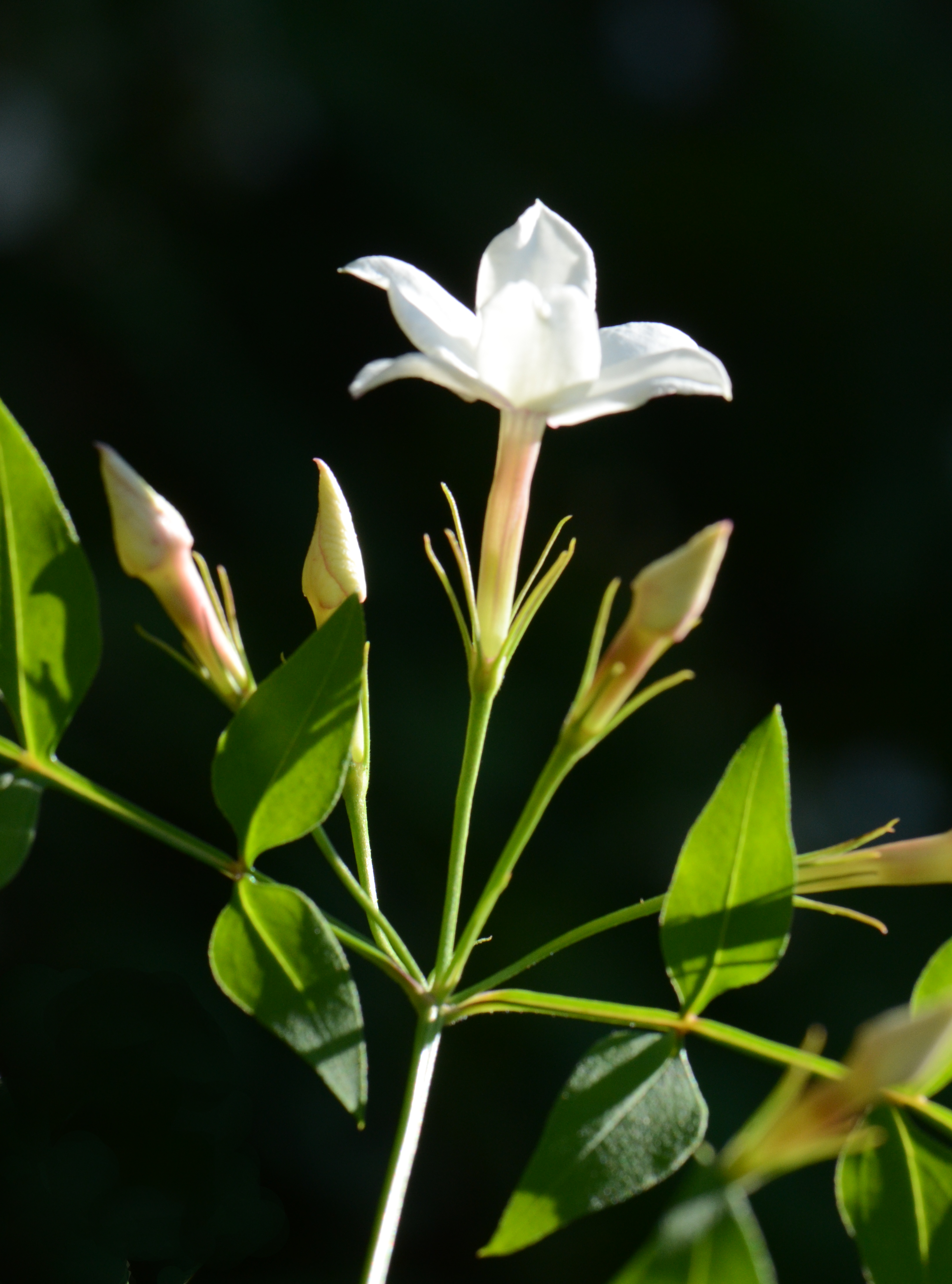 Jasminum officinale, Cognac, lobe du calice subulés, cyme ombelliforme